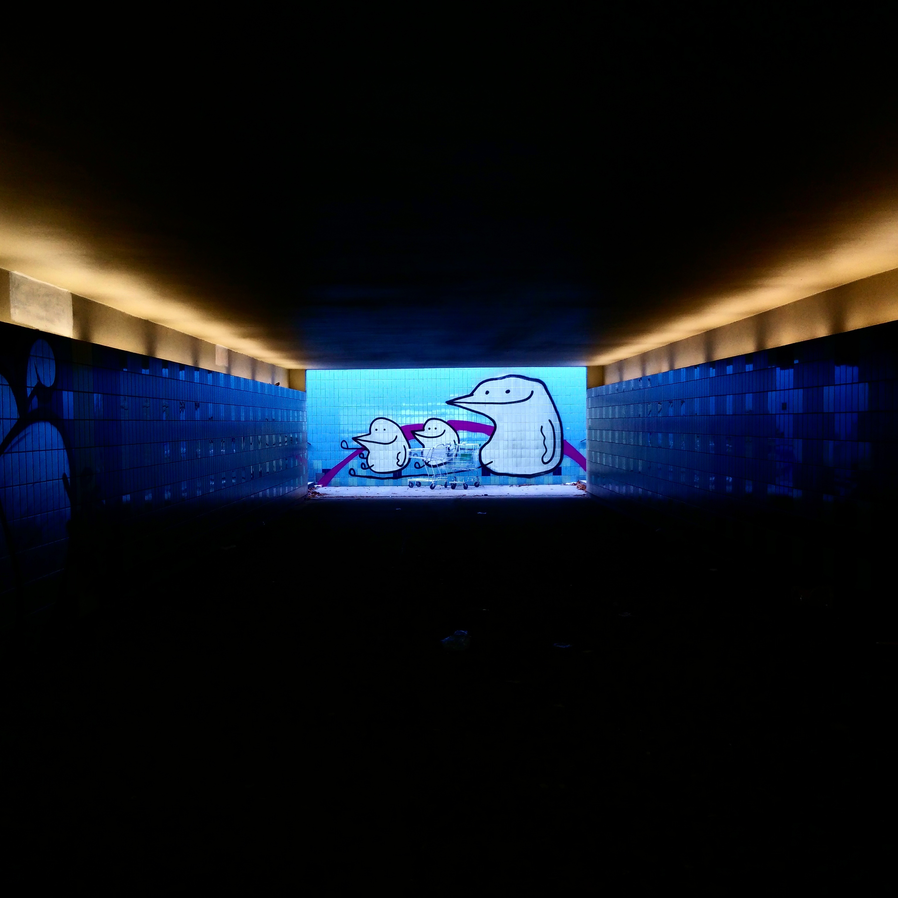 Graffiti vid gångtunneln vid Dalaplan, Malmö.